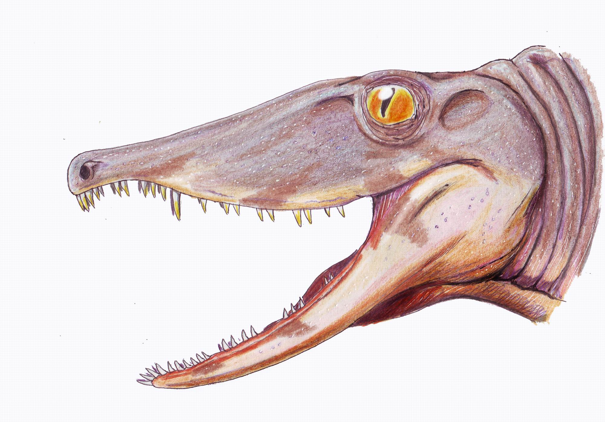 Secodontosaurus obtusidens head